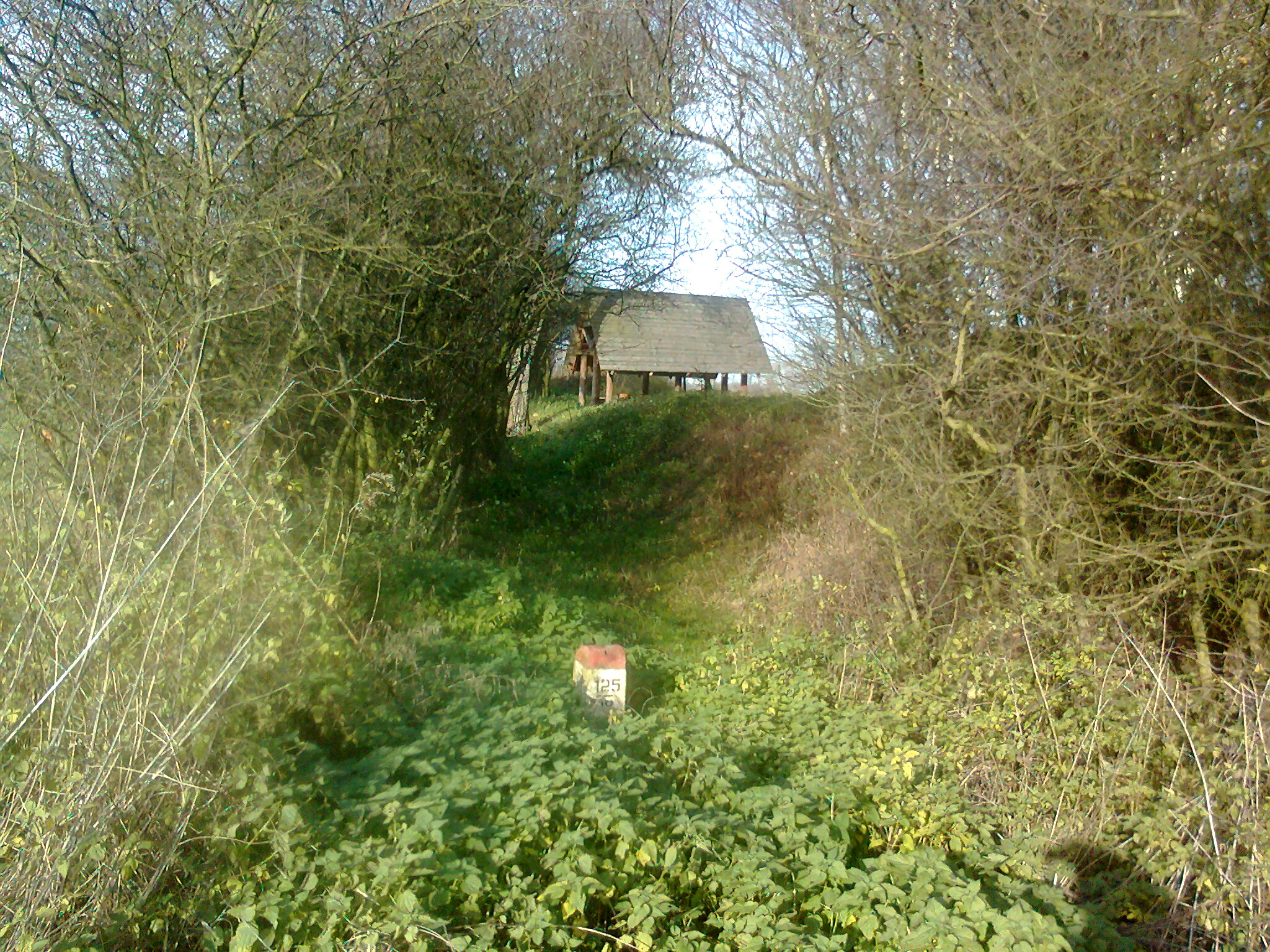 Granica polsko-czeska. Znak graniczny 125/18